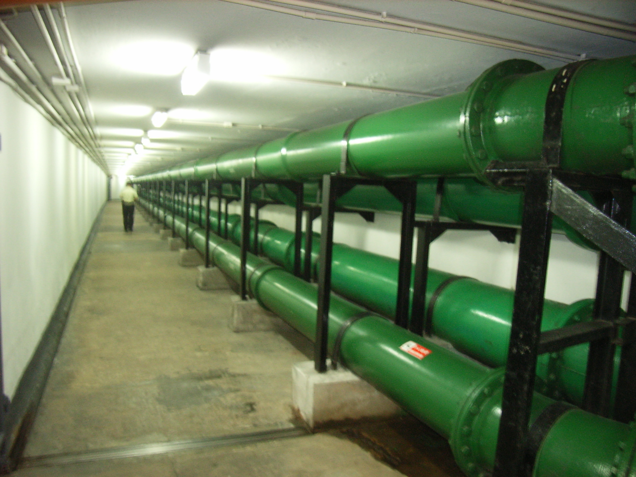 銅鑼灣香港世貿中心 附置大zh:喉管 地下通道